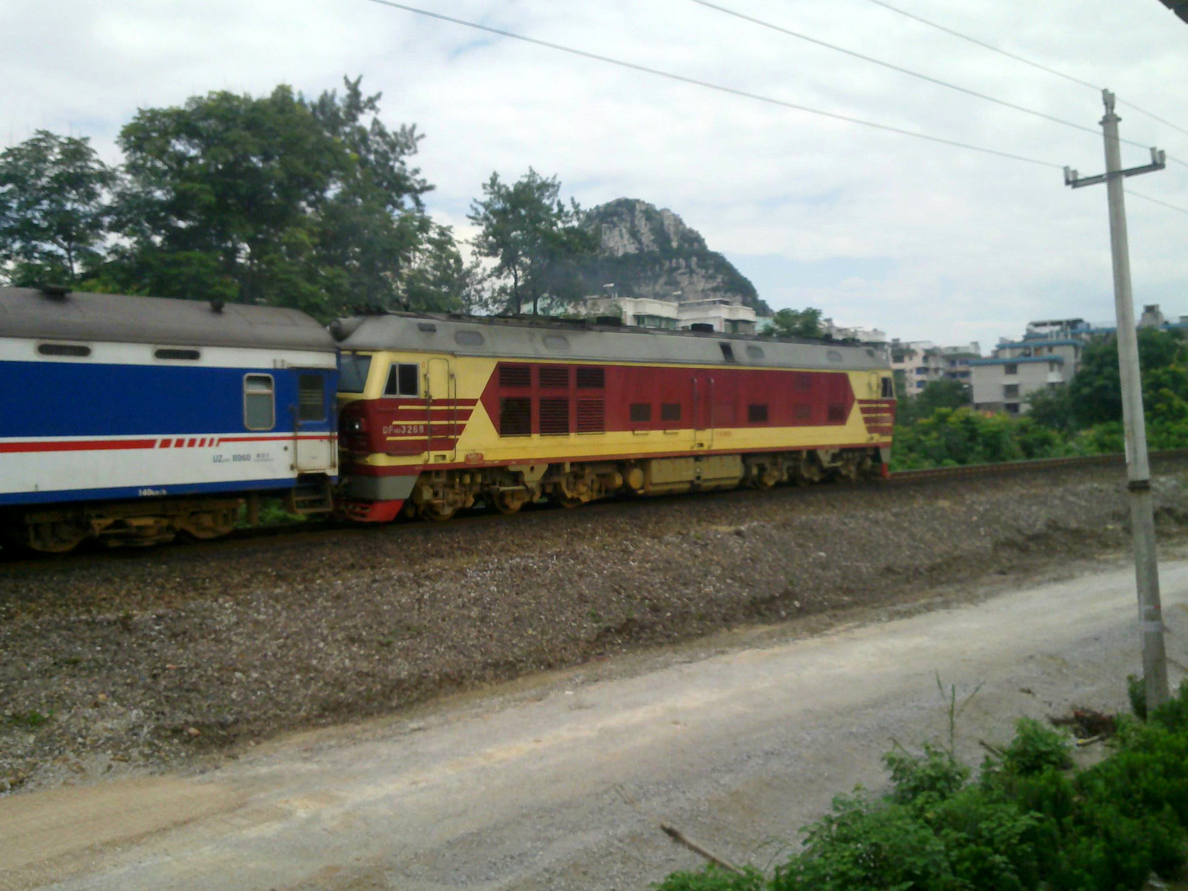 中文（中国大陆）: DF4D 3268牵引T5次驶离桂林站